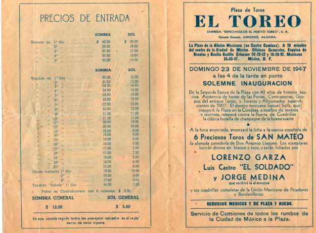 Imagen de mi coleccion personal del programa de la corrida inaugural de la plaza de cuatro caminos